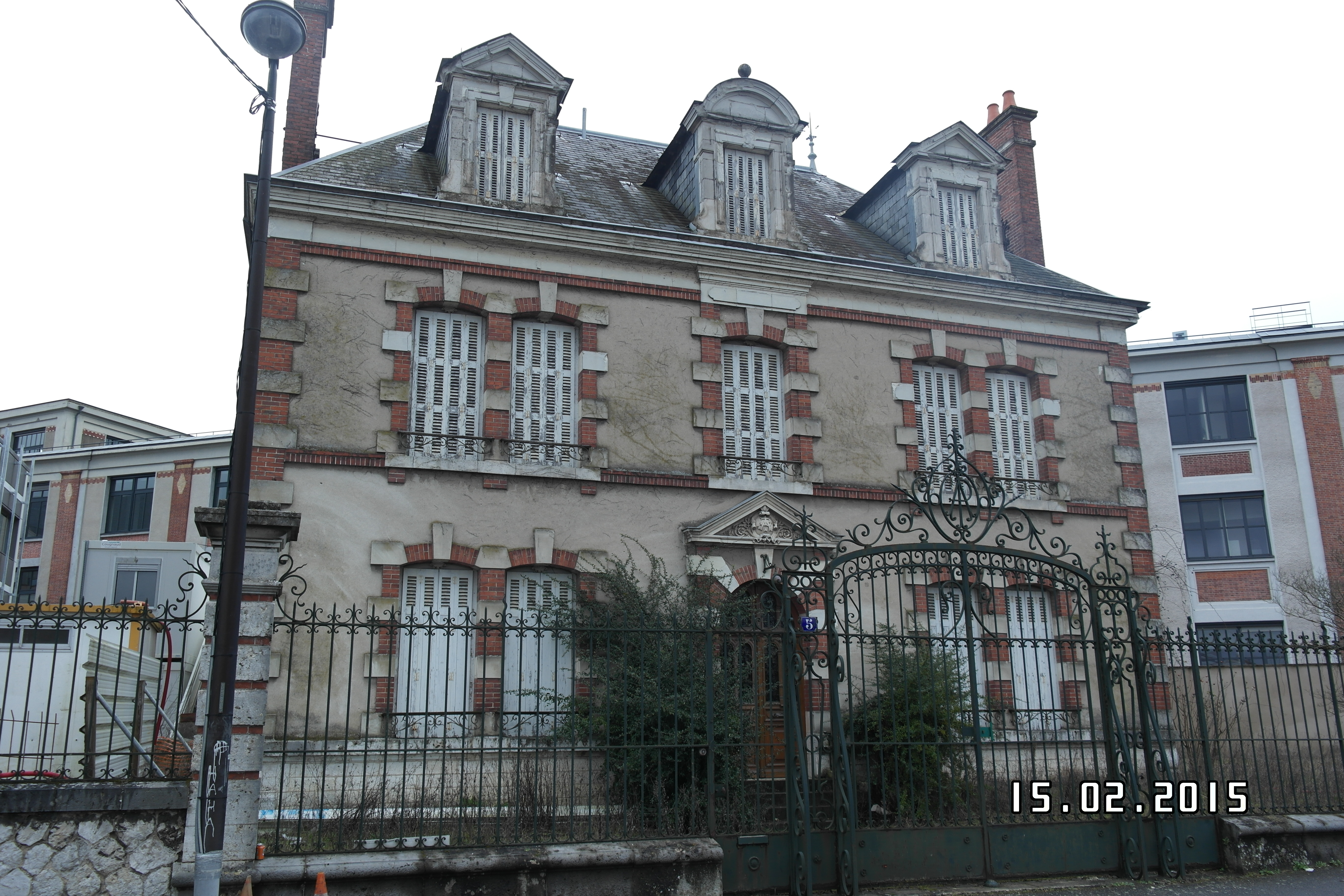 Maison d'Auguste Poulain - chocolaterie Poulain, Blois, France.